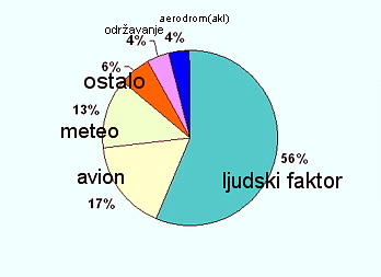 Najčešći uzroci udesa vazduhoplova. Podaci za izradu slike preuzeti sa Niš, 31.oktobar 2009.